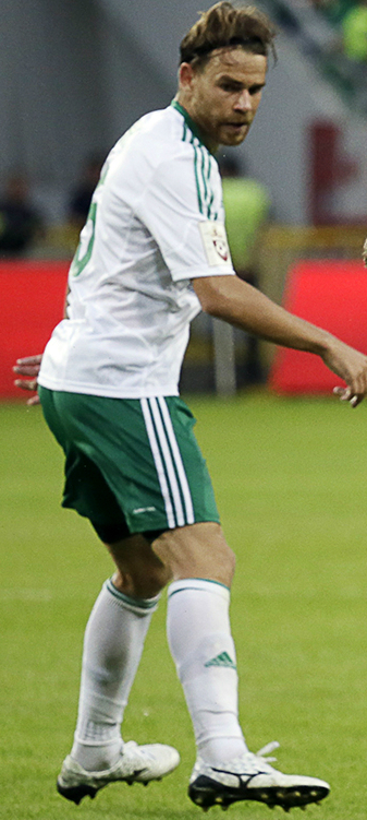 Эрик Бикфалви в составе ФК Томь